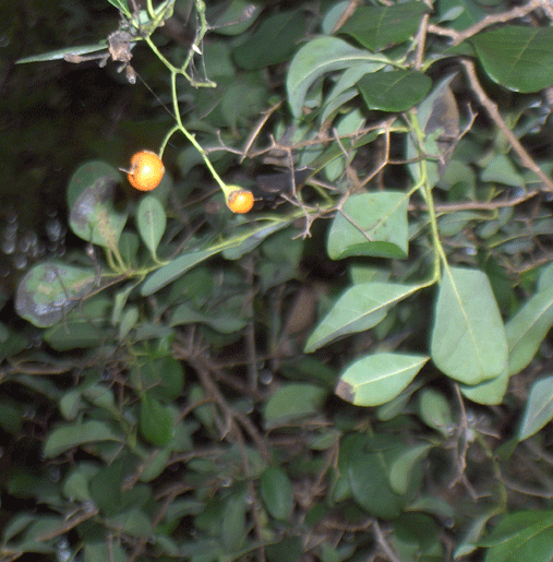 Bahama Strongbark